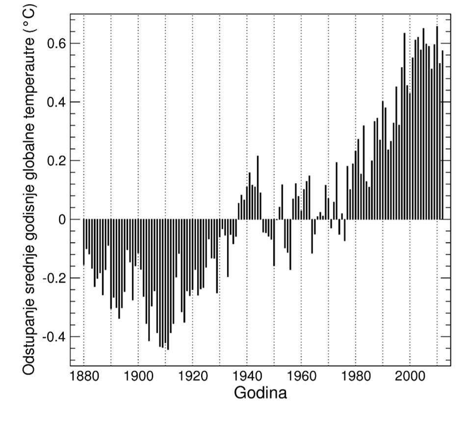 Српски (ћирилица): Одступање средње годишње глобалне температуре